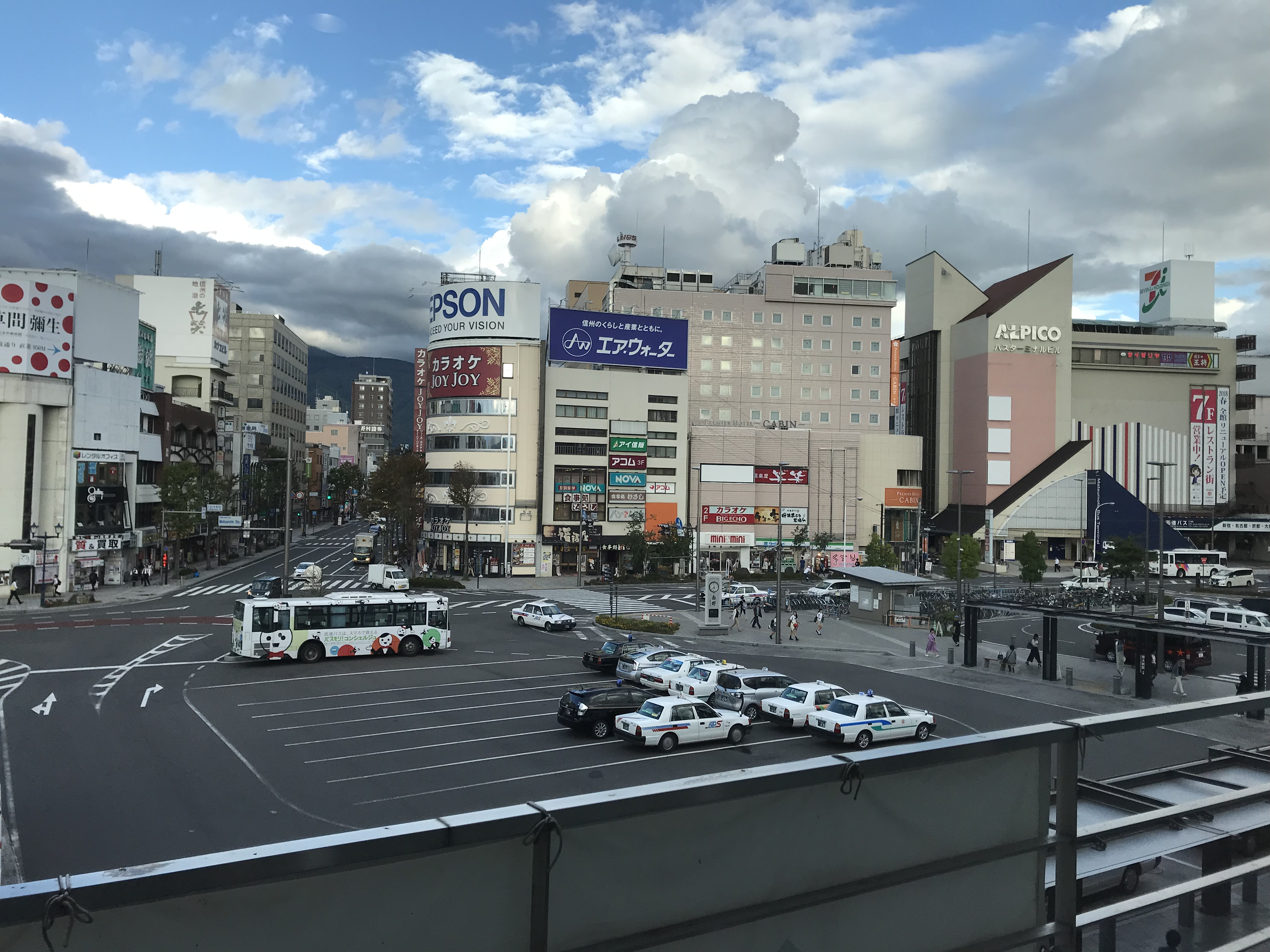 松本駅構内の、東口側エレベーター横からみた、松本駅前。